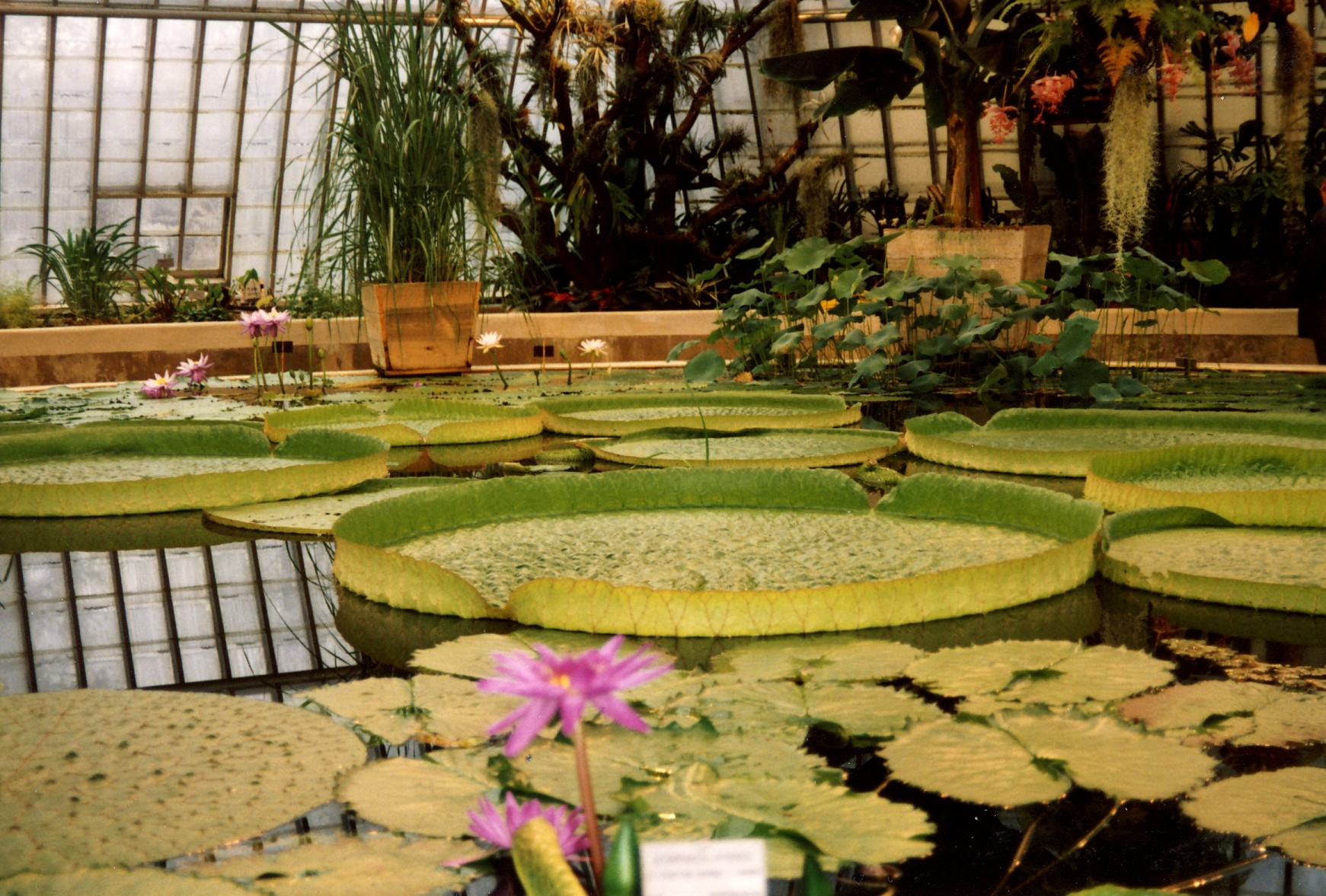 Bergianska trädgården i Stockholm